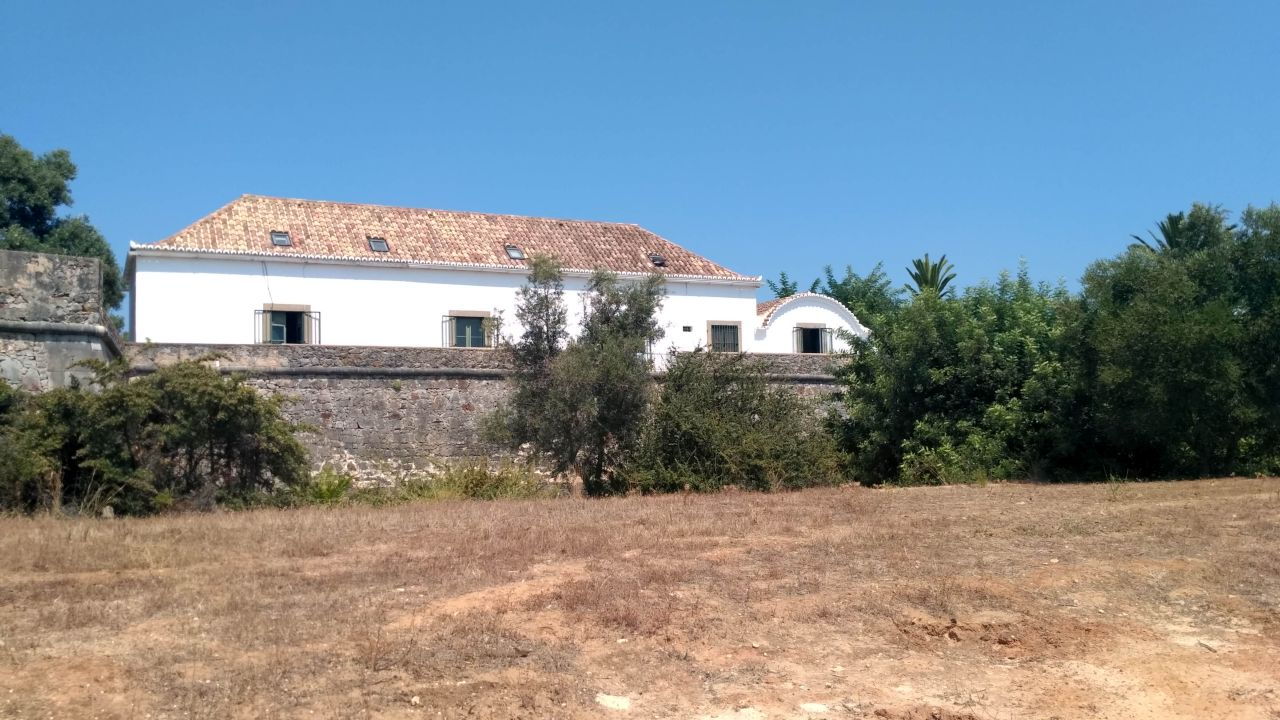 Vista de sul do Forte de São João da Barra, com a Casa do Governador e a pequena capela à sua direita.